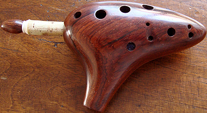 Ocarina a pistone in avorio e cocobolo